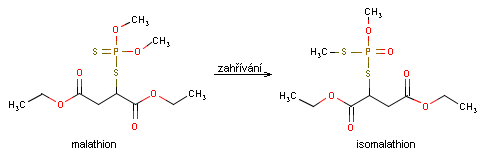 Reakční schema isomerizace malationu na isomation